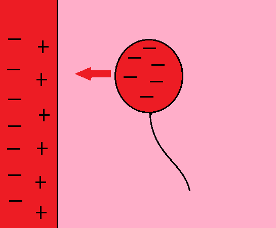 Õhupall tõmbub seina külge kuna erimärgilised laengud tõmbuvad